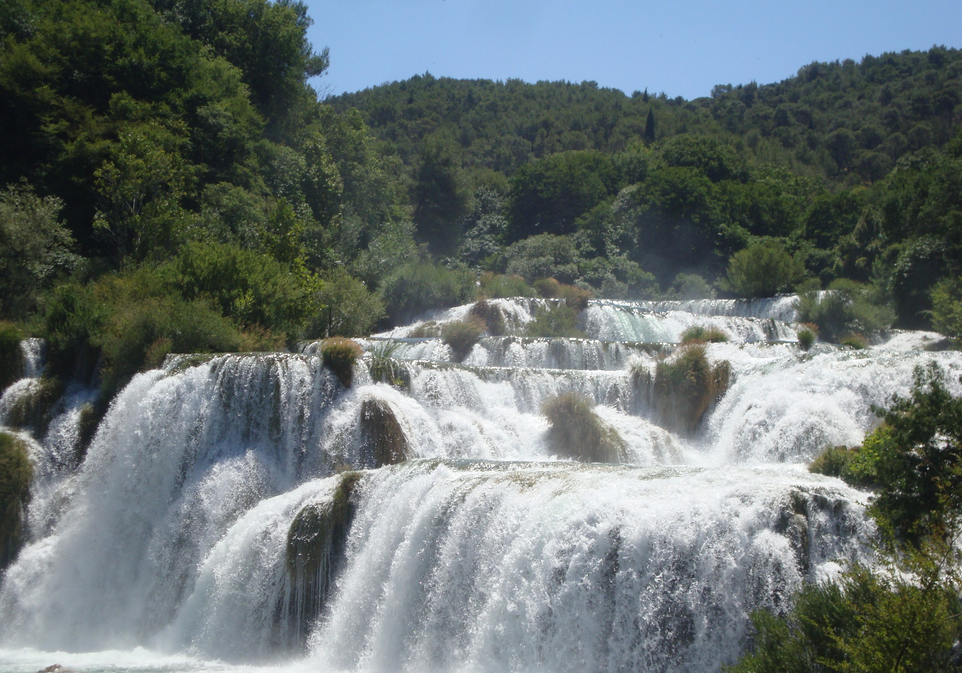 Vodopadi Krke.